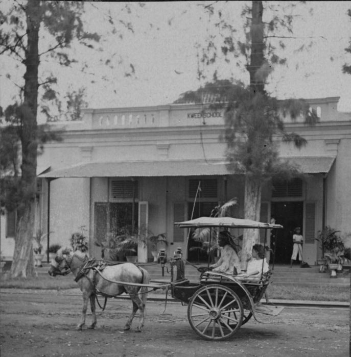 Foto. Thans is in dit gebouw de Katholieke school Mater Dei gevestigd.. Een rijtuig staat stil voor de kweekschool in Probolinggo